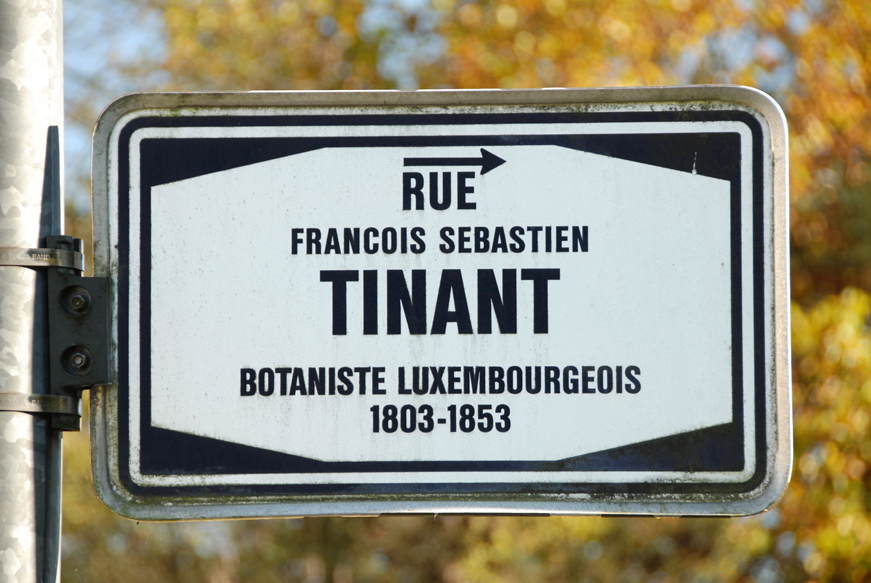 Tinant Stroosseschëld zu Beggen